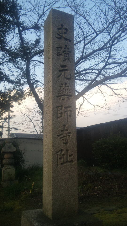 奈良県橿原市にある本薬師寺跡の石碑。